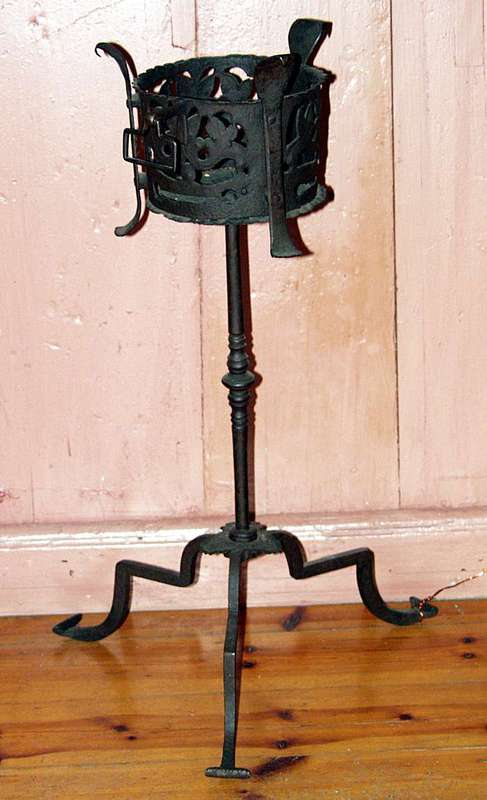 Fyrfat for plassering på gulvet ved siden av bordet. Laget i smijern og er antakelig fra 1700-årene. Høyde 70 cm. Foto Haakon Harris / Norsk Folkemuseum, NF1898-0348.